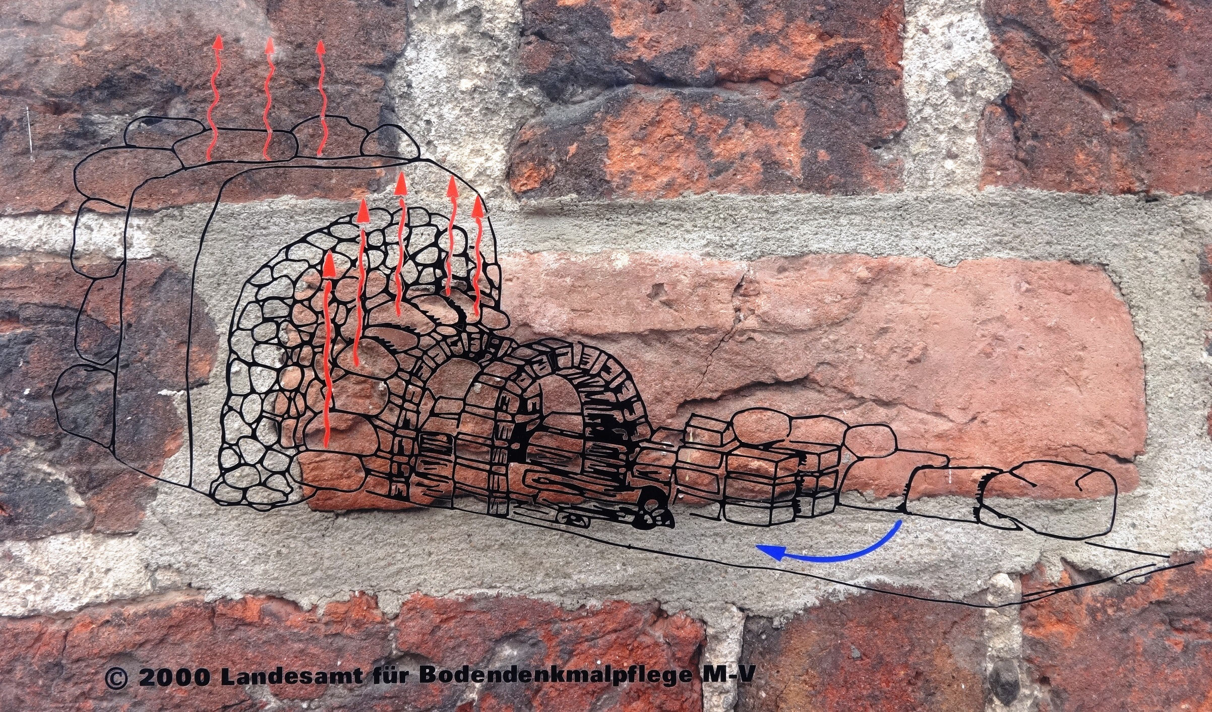 Backsteinbau aus dem 13. Jahrhundert, genutzt als Hospital, heute Altenheim. Eine Warmluftheizung aus dem 13. Jahrhundert ist nachgewiesen Pasewalk, Mecklenburg-Vorpommern Zeichnung aufgenommen auf einer frei zugänglichen Informationstafel am Spital